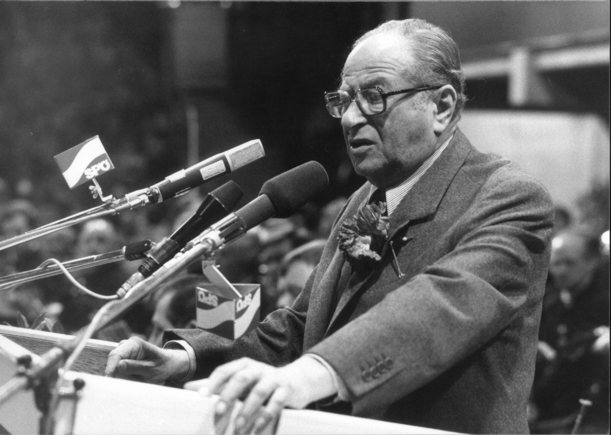 Bruno Kreisky 1983 auf einer Wahlkampfveranstaltung für die österreichische Nationalratswahl